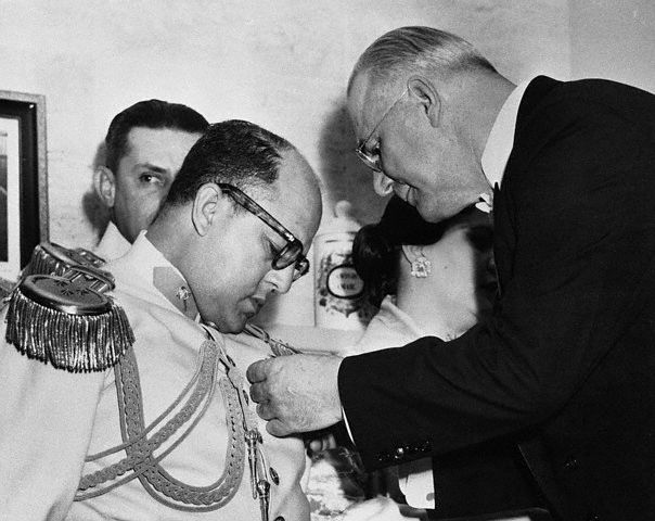 General Marcos Pérez Jiménez recibiendo la "Legion of Merit" en Caracas el 13 de febrero de 1954, la condecoración más alta otorgada por los EE.UU. a personalidades extranjeras, de manos del embajador Fletcher Warren, en nombre del Presidente de E.E.U.U Eisenhower.